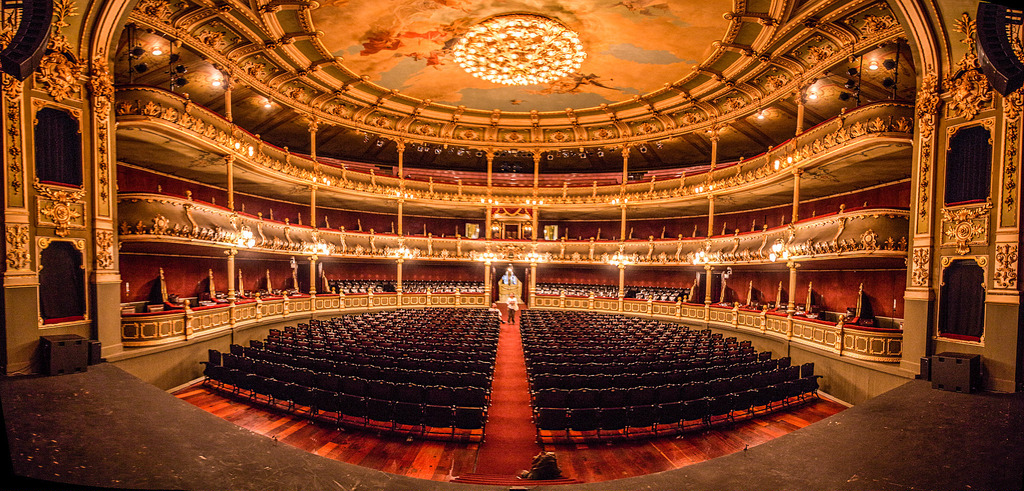 Sala del Teatro Nacional de Costa Rica